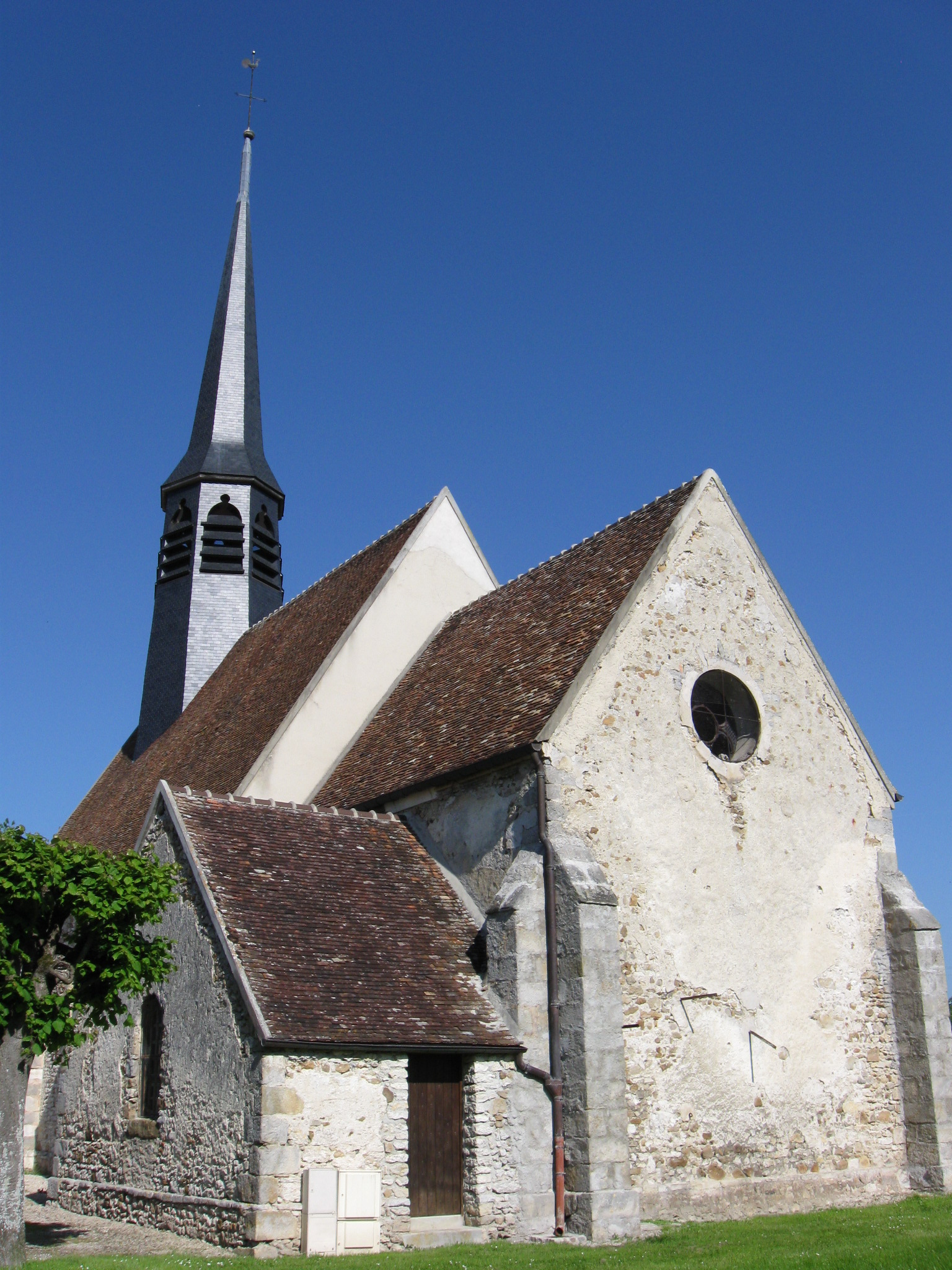 Église Sainte-Geneviève de Mouy-sur-Seine. (département de la Seine-et-Marne, région Île-de-France).